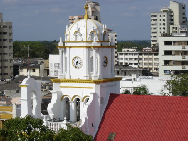 Catedral san Jerónimo de Montería.